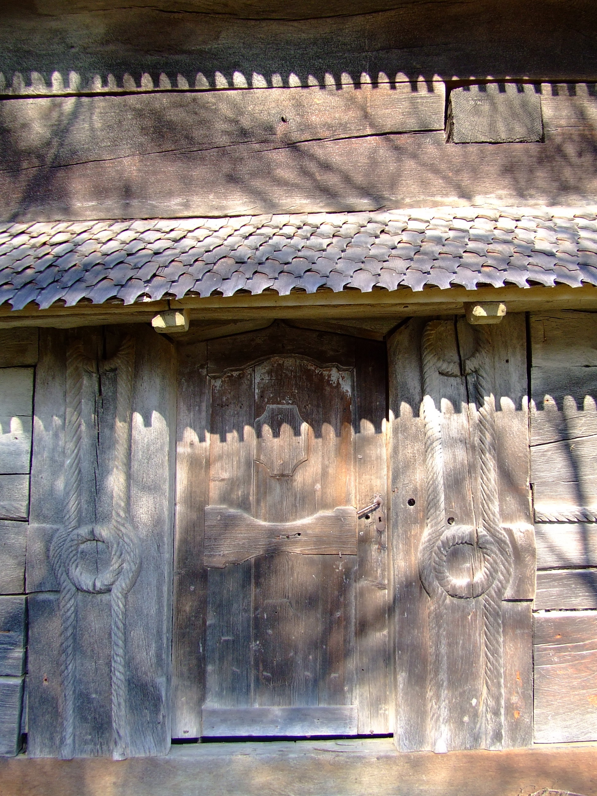 Biserica de lemn din Domnin, judeţul Sălaj. Portalul intrării.